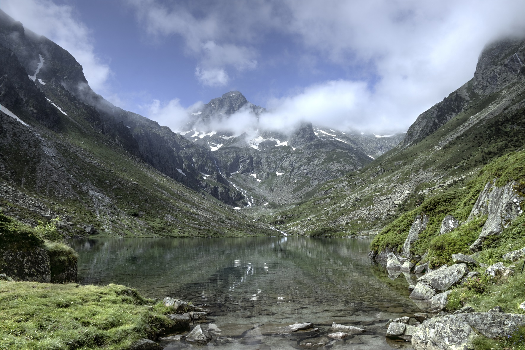 lac pyrénéen